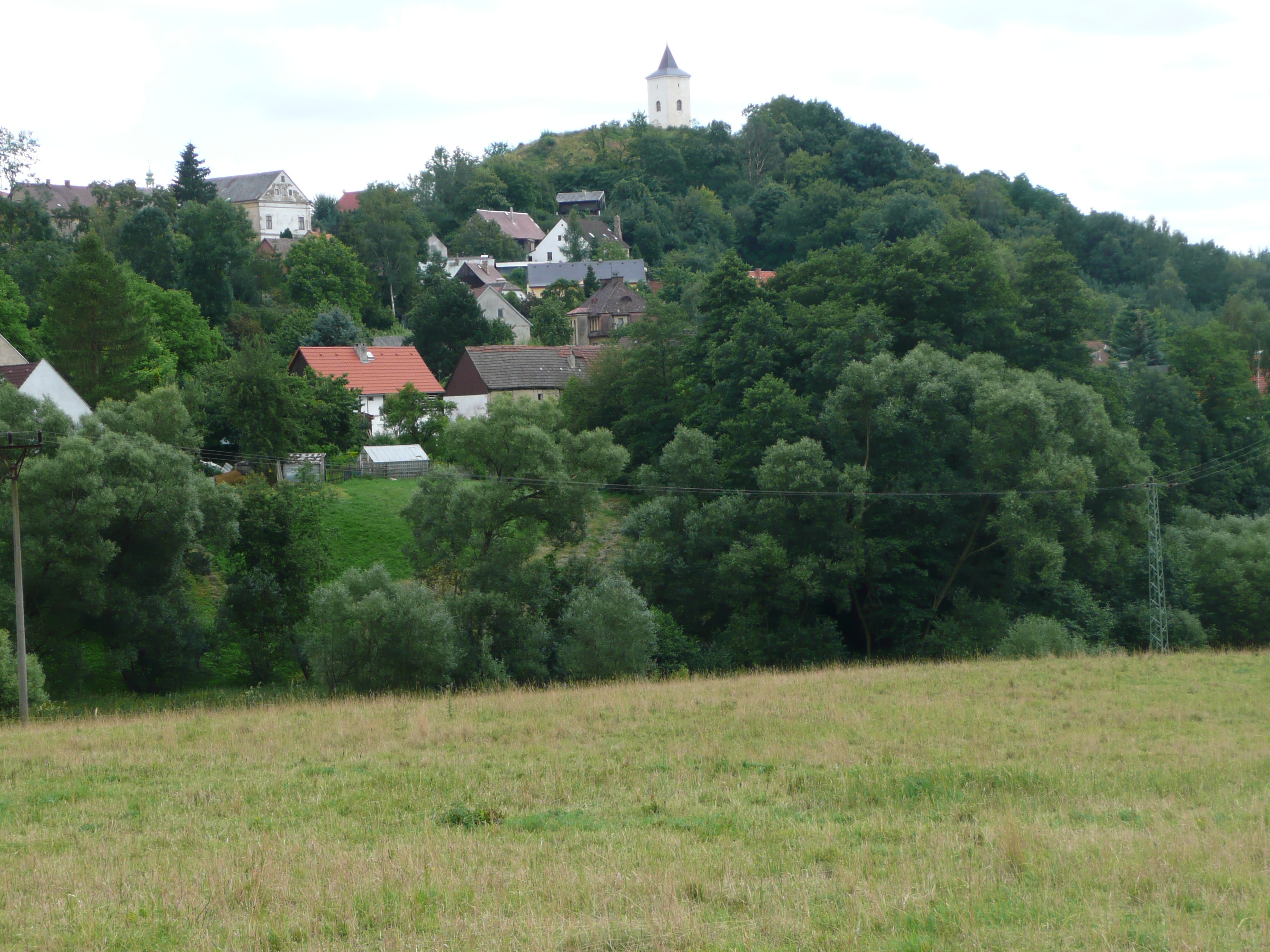 Ansicht von Levin von Loveckovice aus mit dem Glockenturm